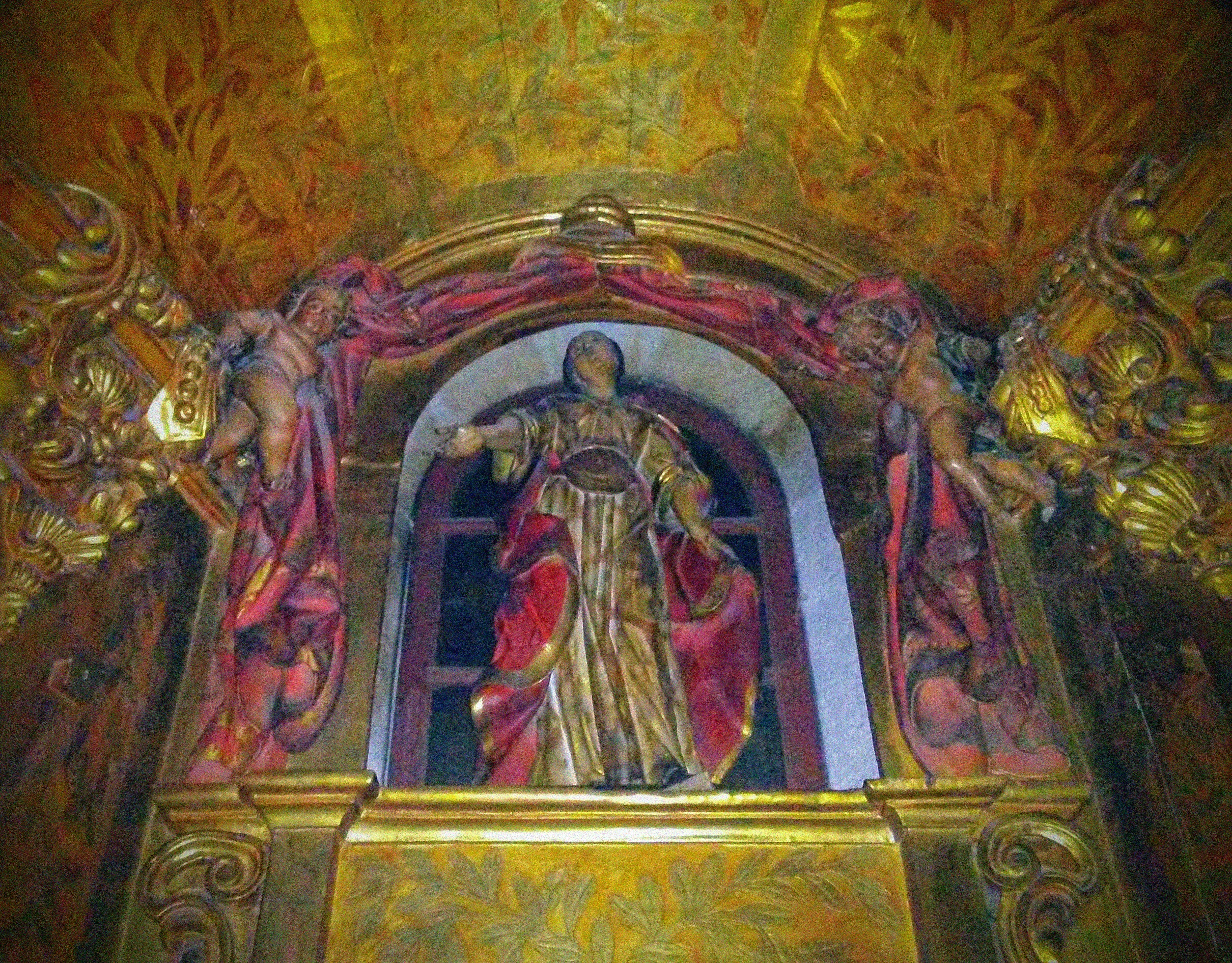 Retablo de Santa Eufemia (Catedral Ourense)